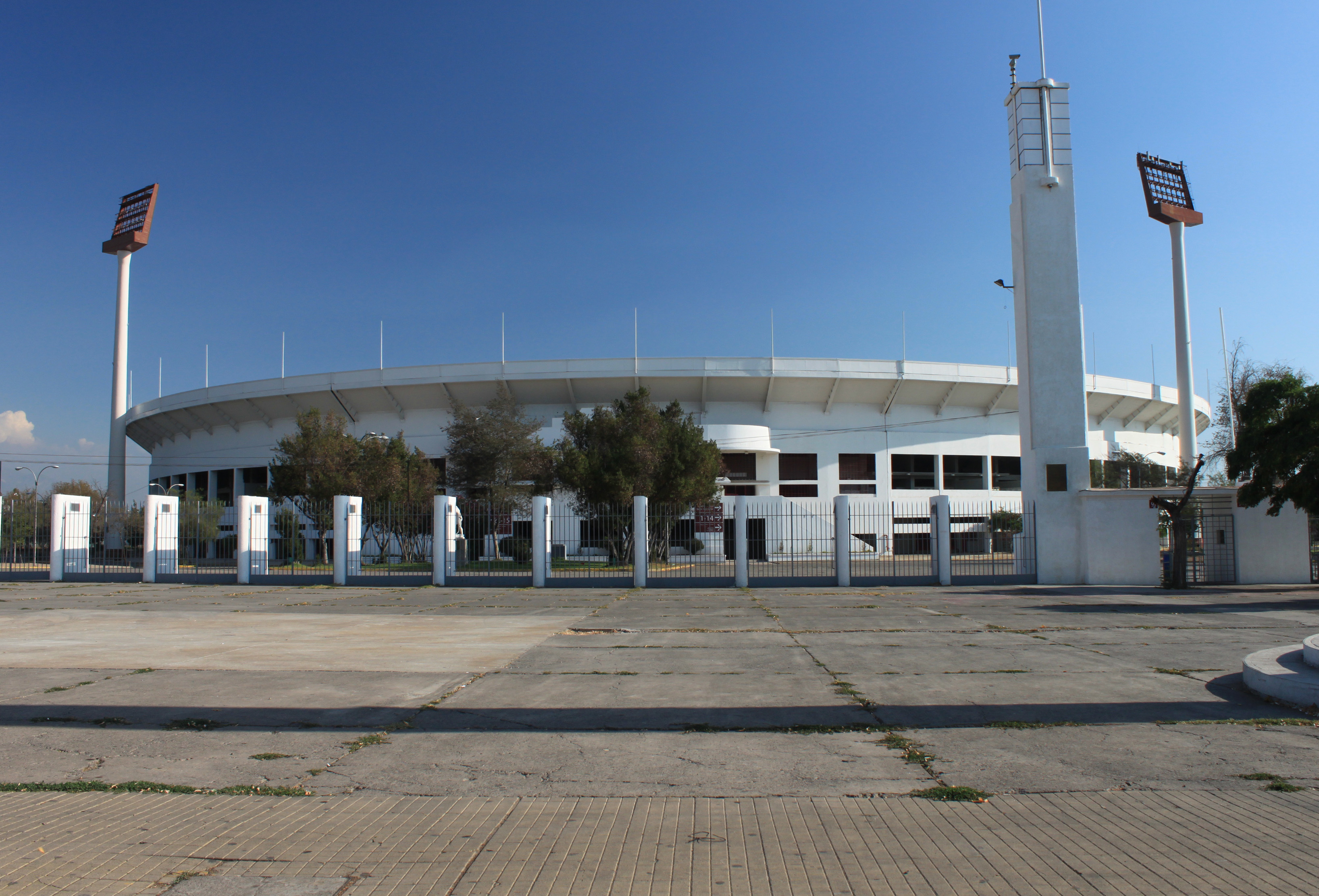 Estadio Nacional. Acceso-Principal por Av. Grecia